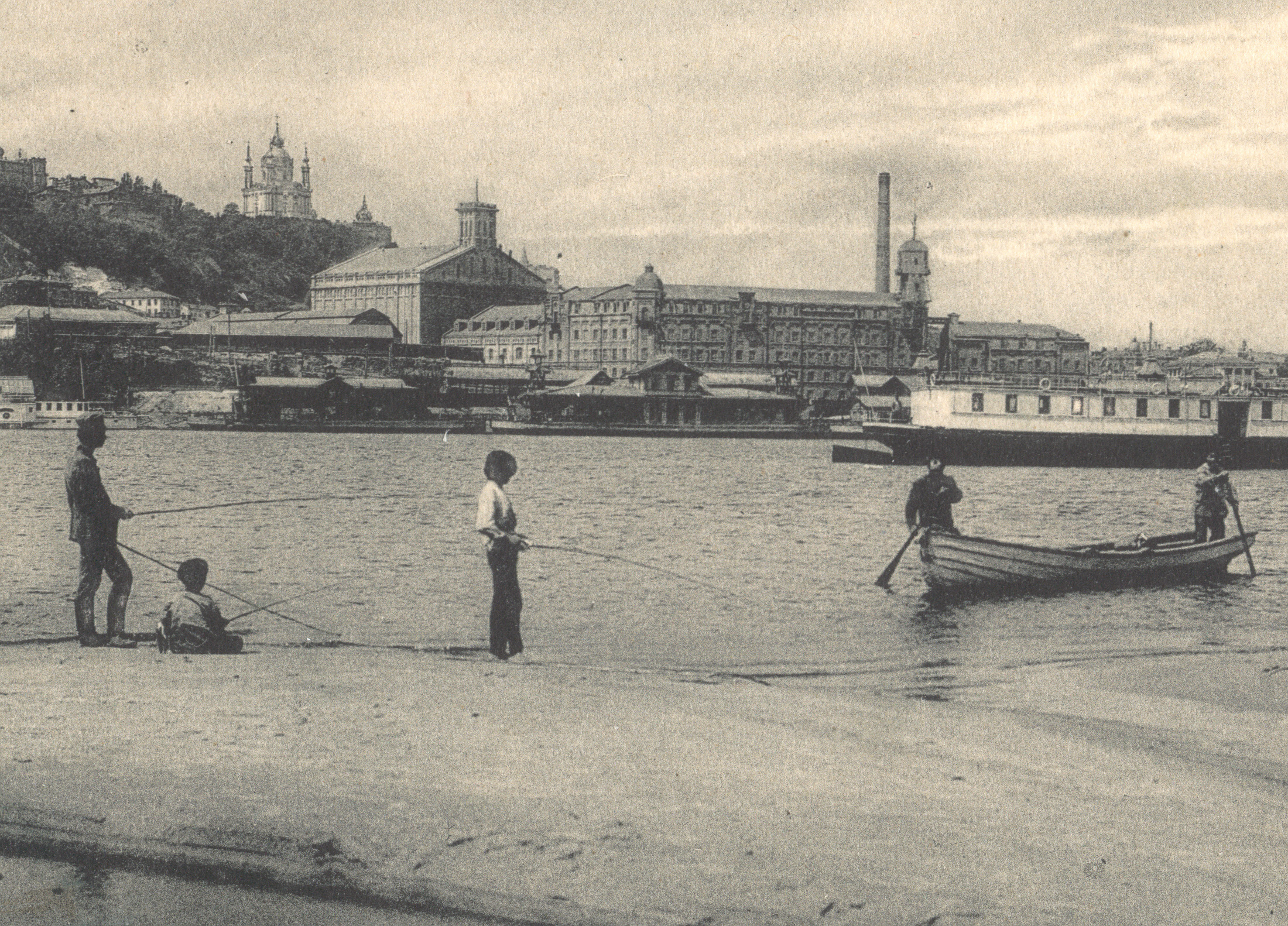 Kiev, «Lazar Brodsky» flour mill. From postcard.